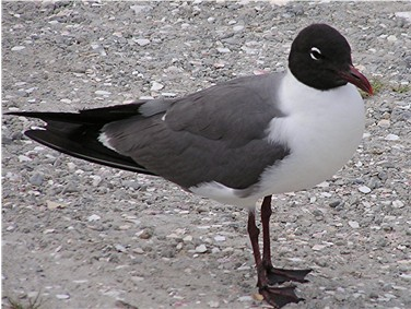 lachmeeuw Larus atricilla eigen foto Categorie:Afbeelding vogel